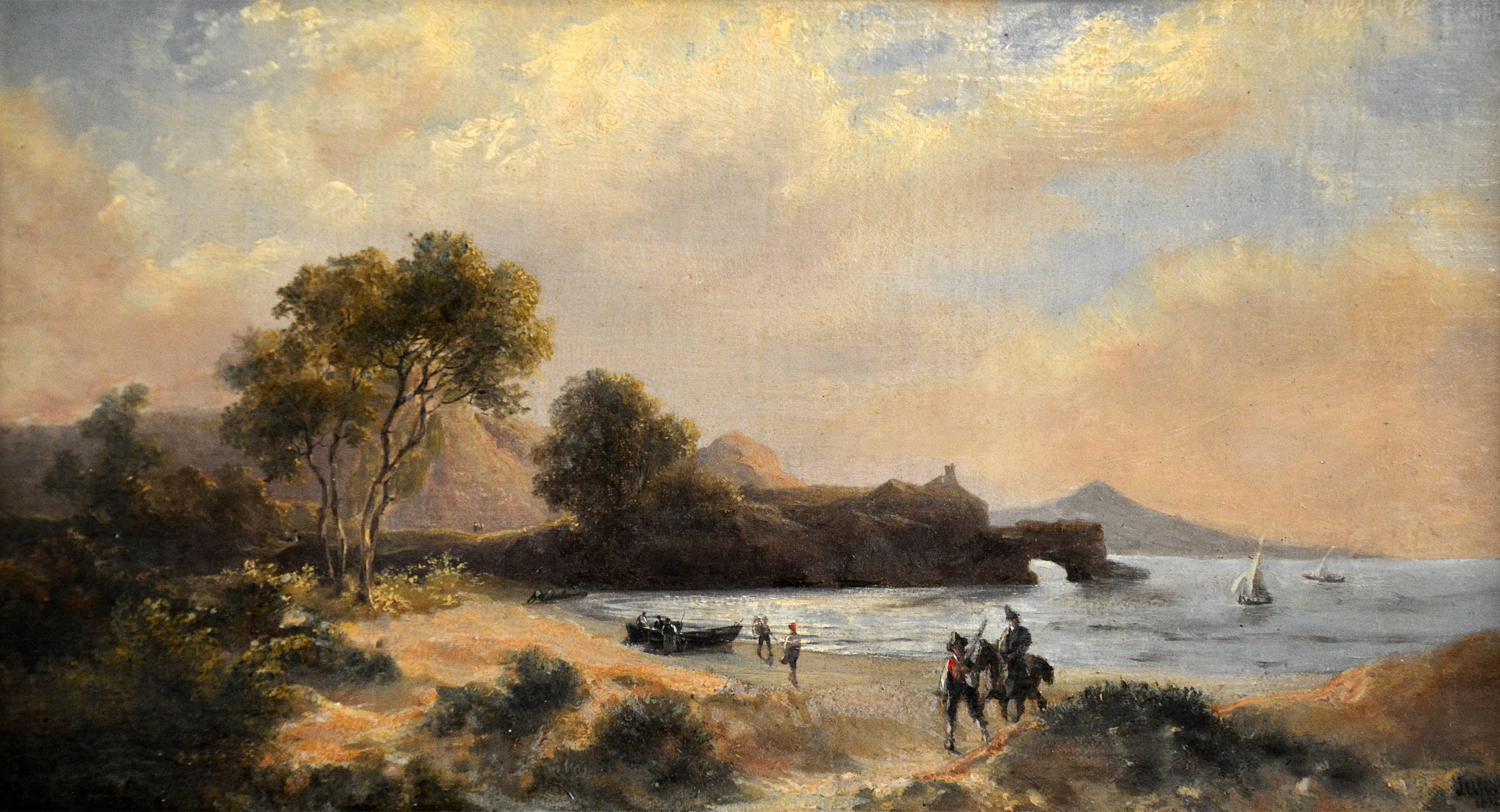 Südliche Landschaft, Ölgemälde